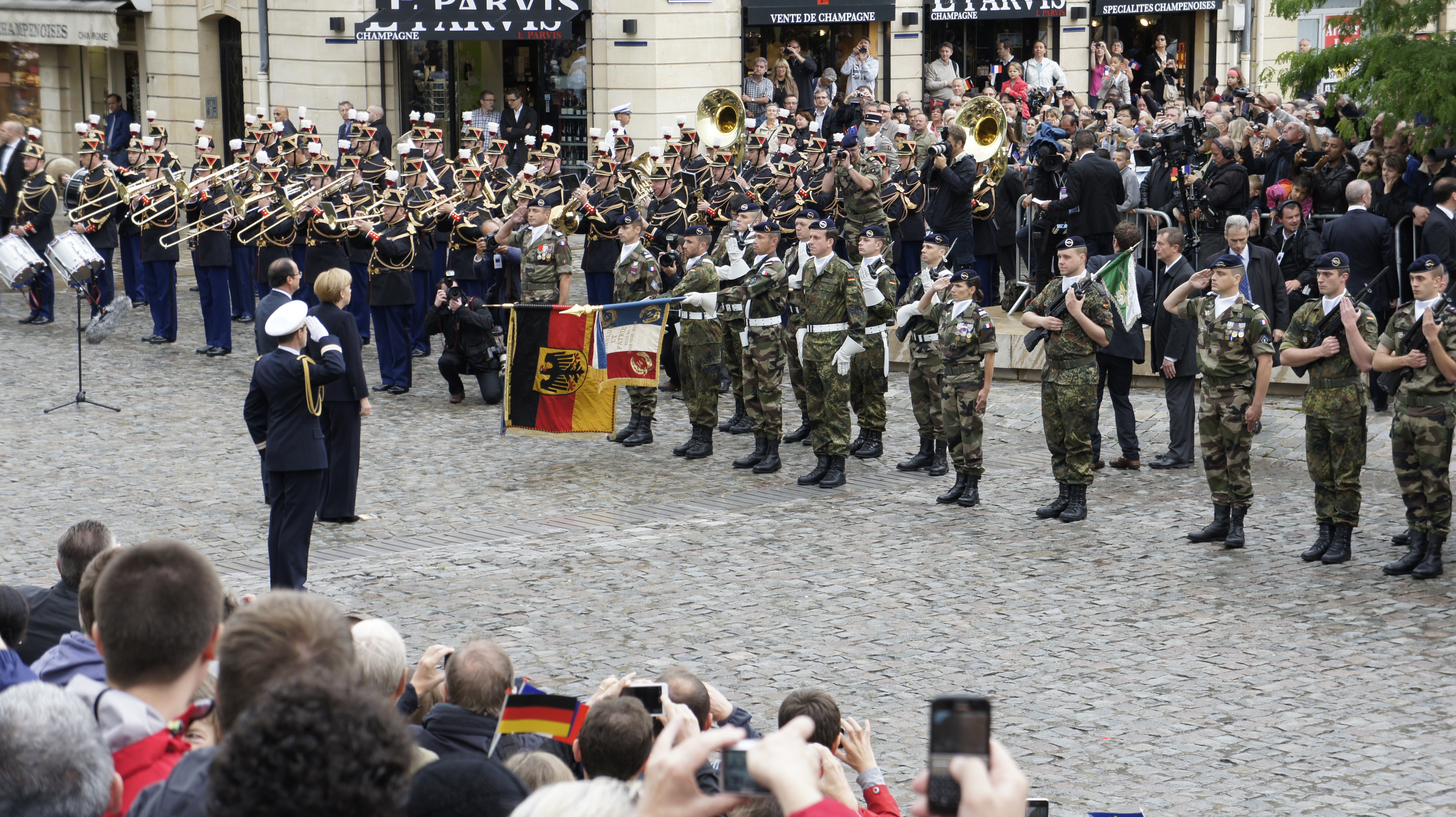 Hollande et Merkel recevant le salut de la Brigade franco-allemande à Reims.Musique de la Garde républicaine.